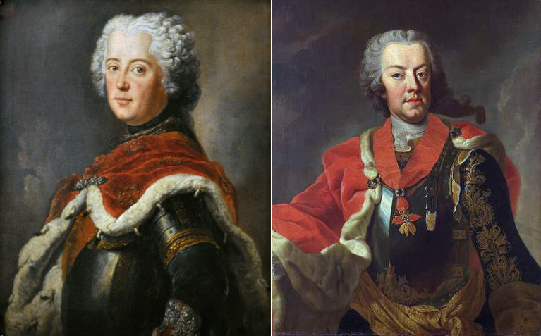 Friedrich II. von Preußen und Karl von Lothringen.